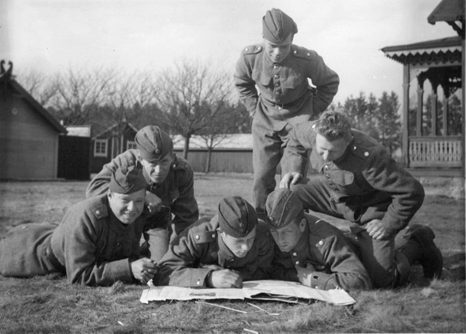 Vid tyska ockupationen flydde ett danskt kompani över till Sverige i hopp om att kunna fortsätta kampen därifrån. Soldaterna internerades i Ljungbyhed. Här ses några av dem följa händelserna i dagstidningen.